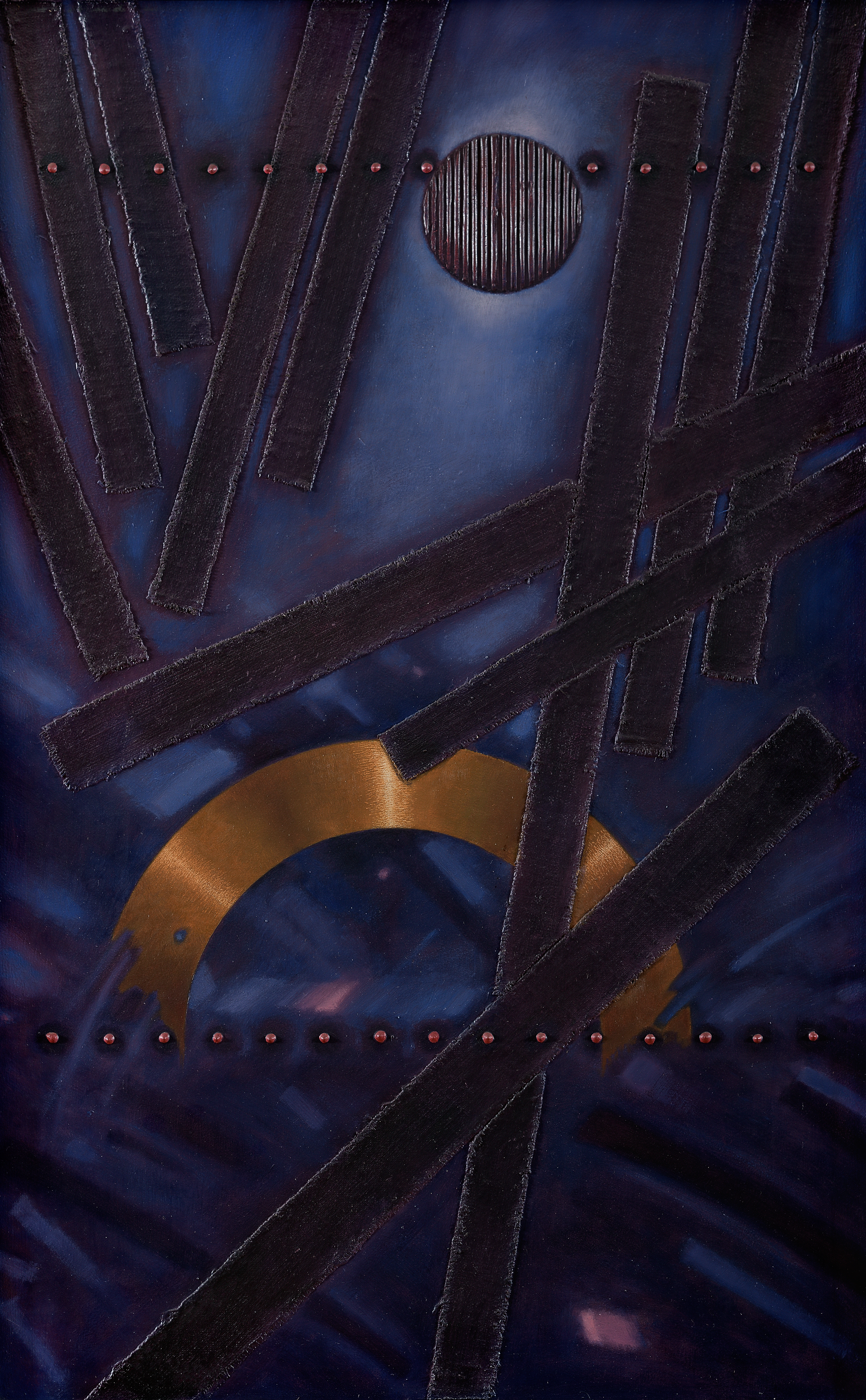 Józef Sowada, Zawsze nadzieja II, 1992, 78x48